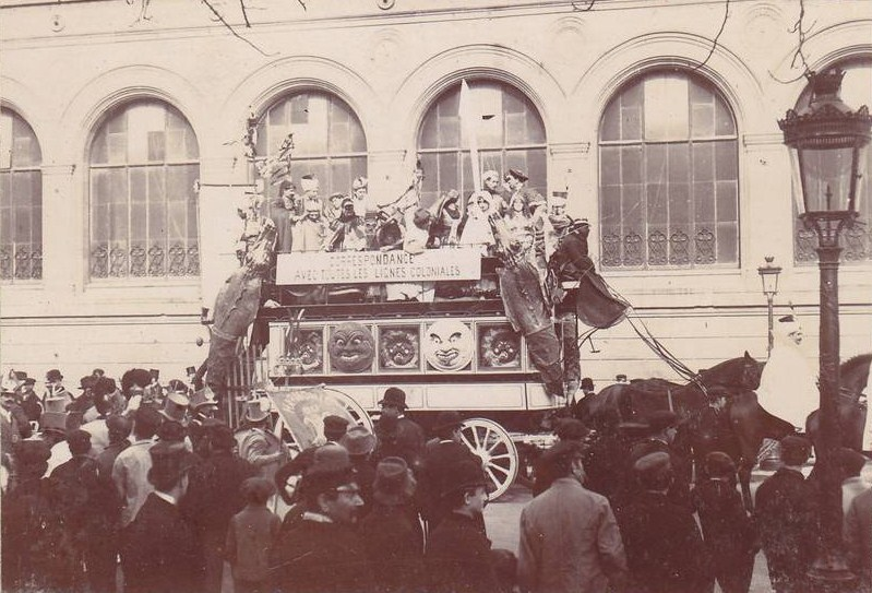 L'omnibus du cortège des étudiants à la Mi-Carême 1894